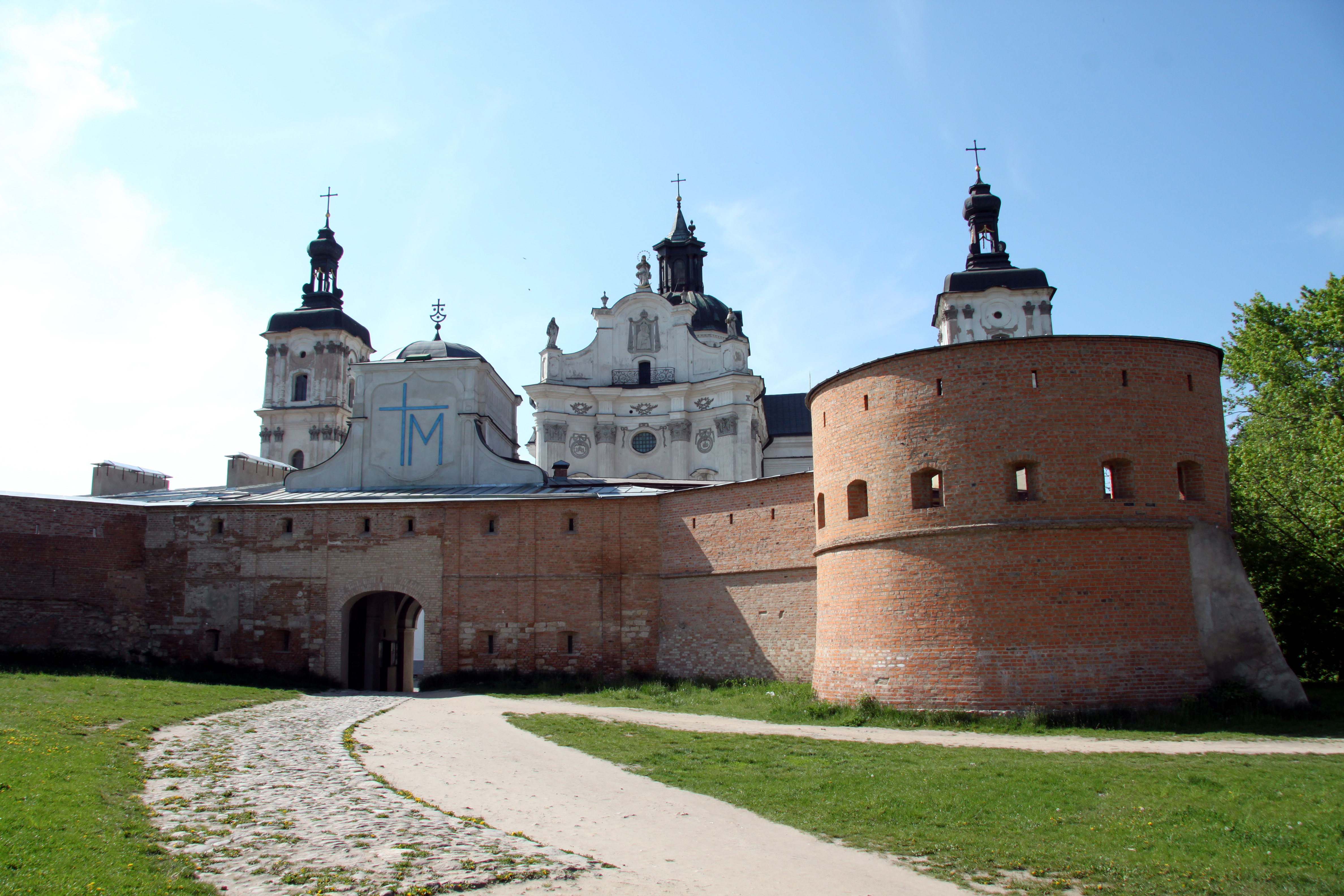 Кармелітський монастир, Соборна пл., 25, Бердичів